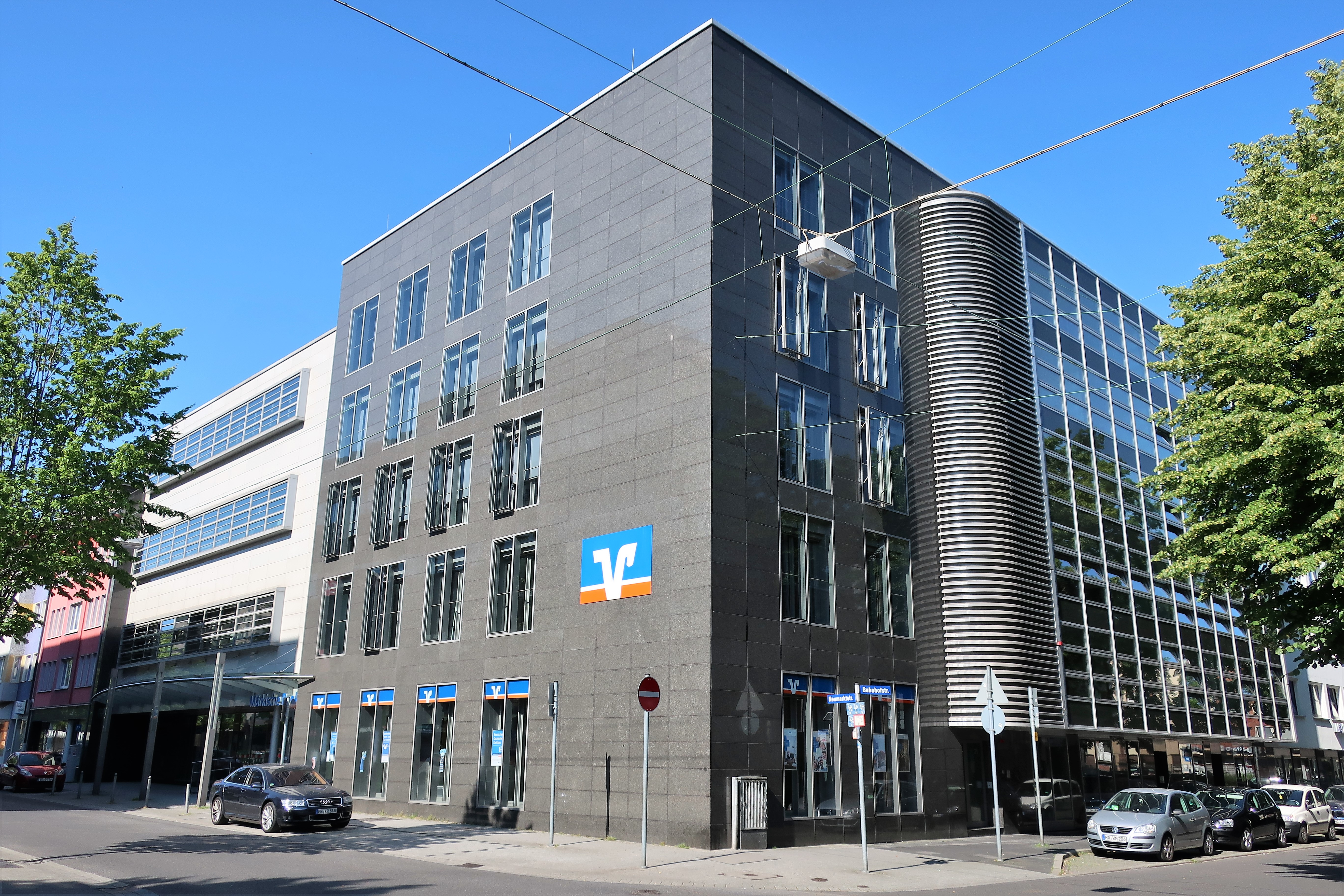 Märkische Bank in Hagen-Mitte, Hauptstelle Bahnhofstraße 21 Ecke Neumarktstraße.